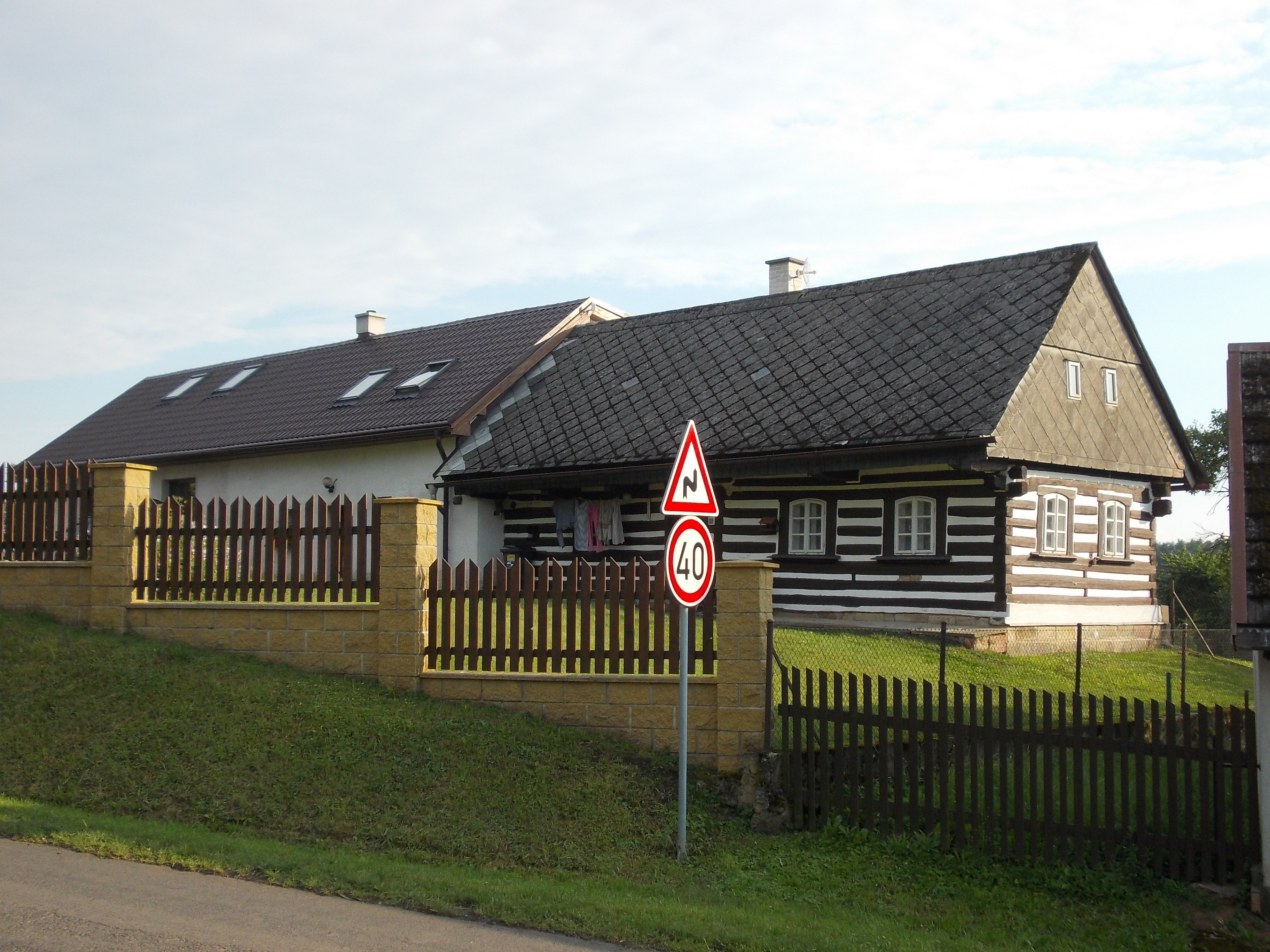 Cidlina - dům č.p. 3